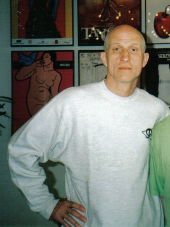 Maciej Kozłowski (ur. 8 września 1957 w Kargowej) - polski aktor teatralny i filmowy.